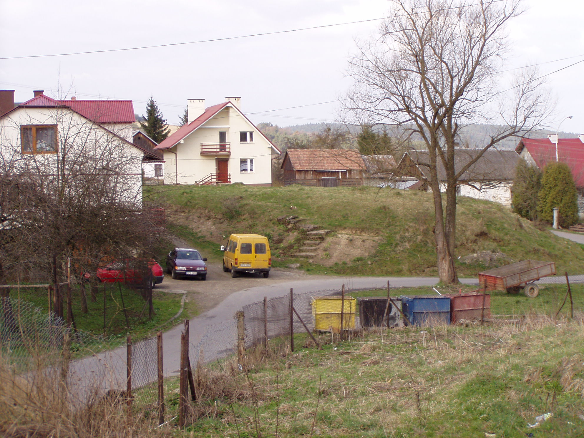 Miejsce po "starej" cerkwi w Birczy